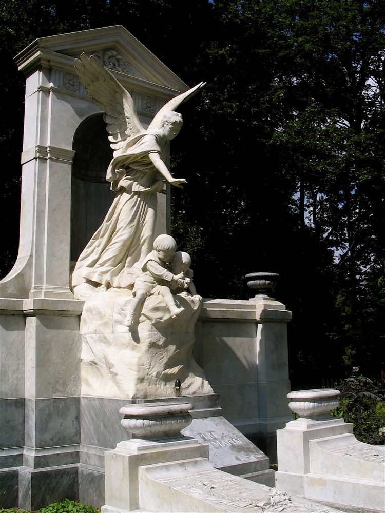 Grobowiec Sophie Bidermann na Starym Cmentarzu w Łodzi